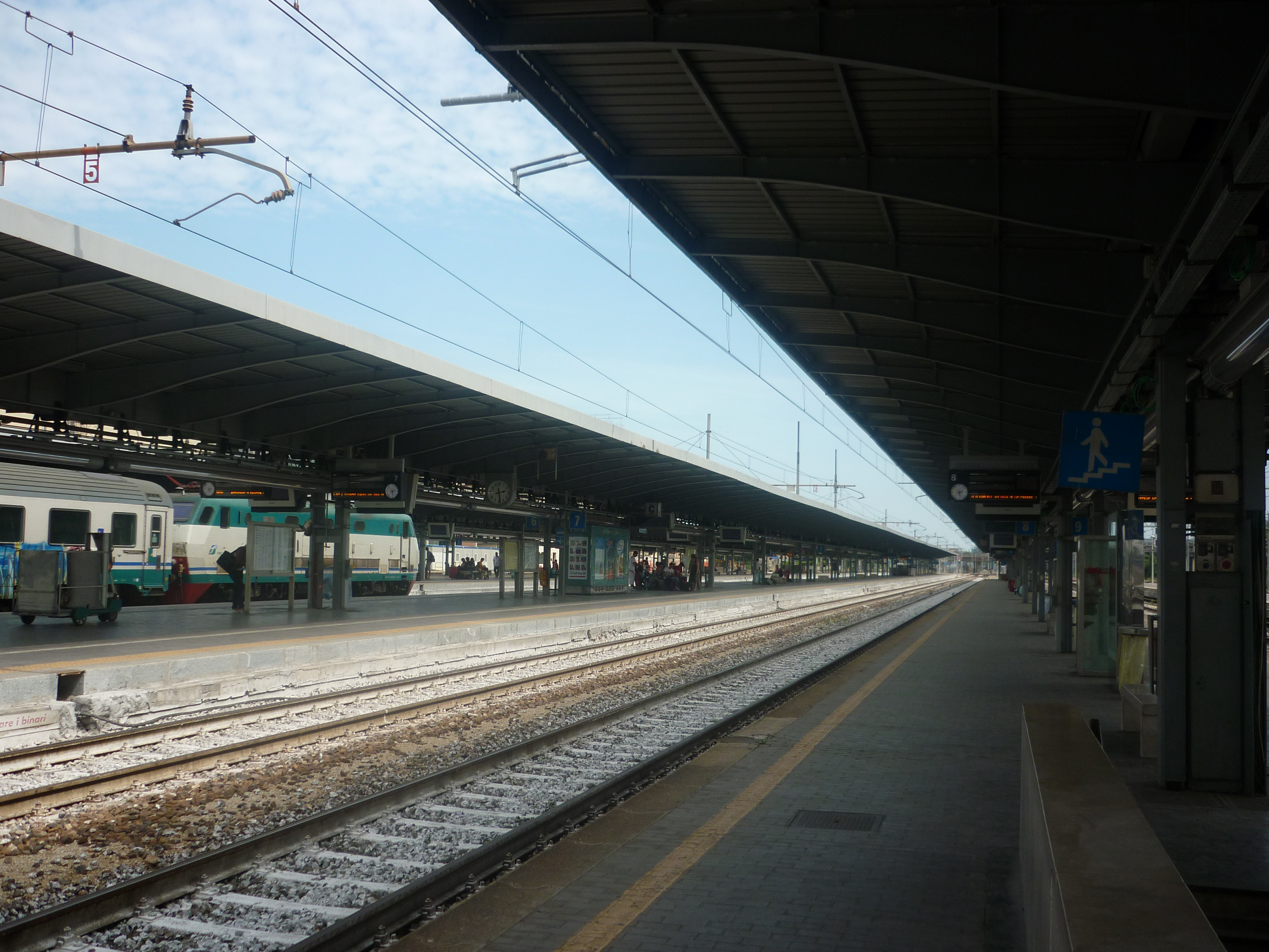 fs